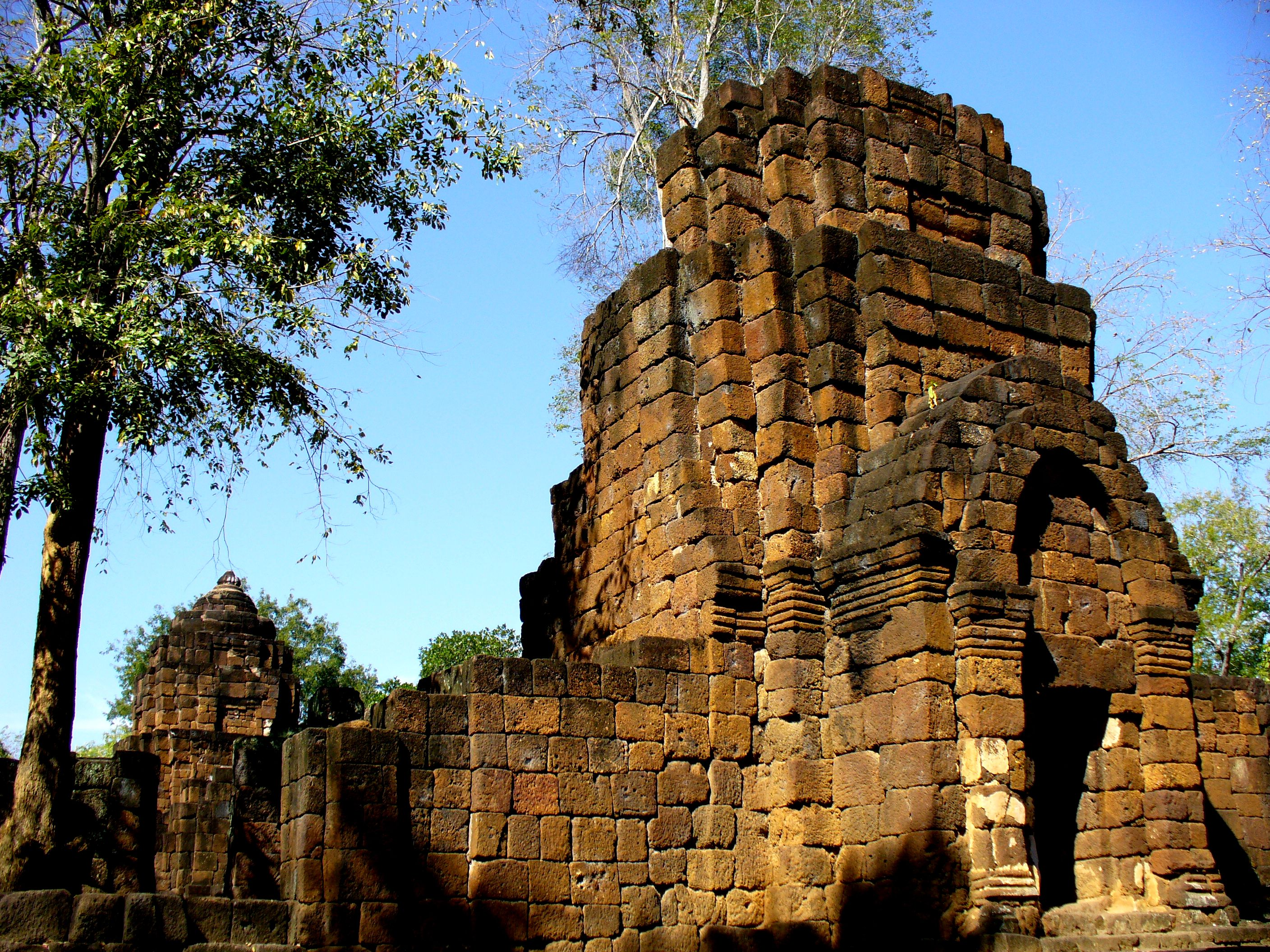 Prasat Muang Sing Historical Park, Thakilen, Thailand